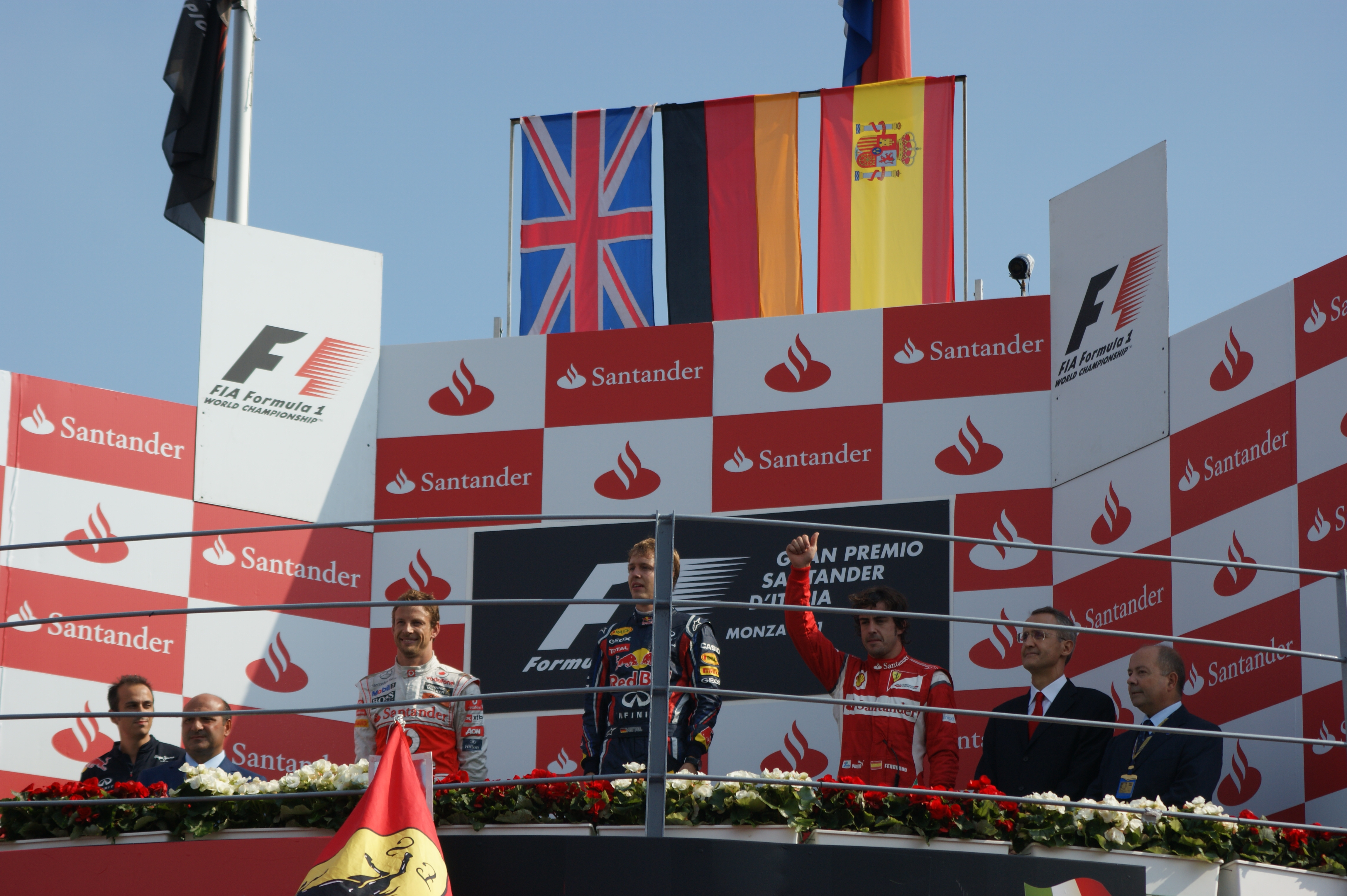 Il podio visto dalla pista Monza 2011